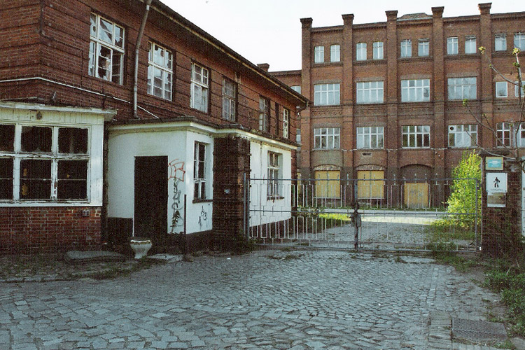 Der Eingang (Ottomar-Geschke-Str.) der ehem. Wäschereibetriebe Spindler